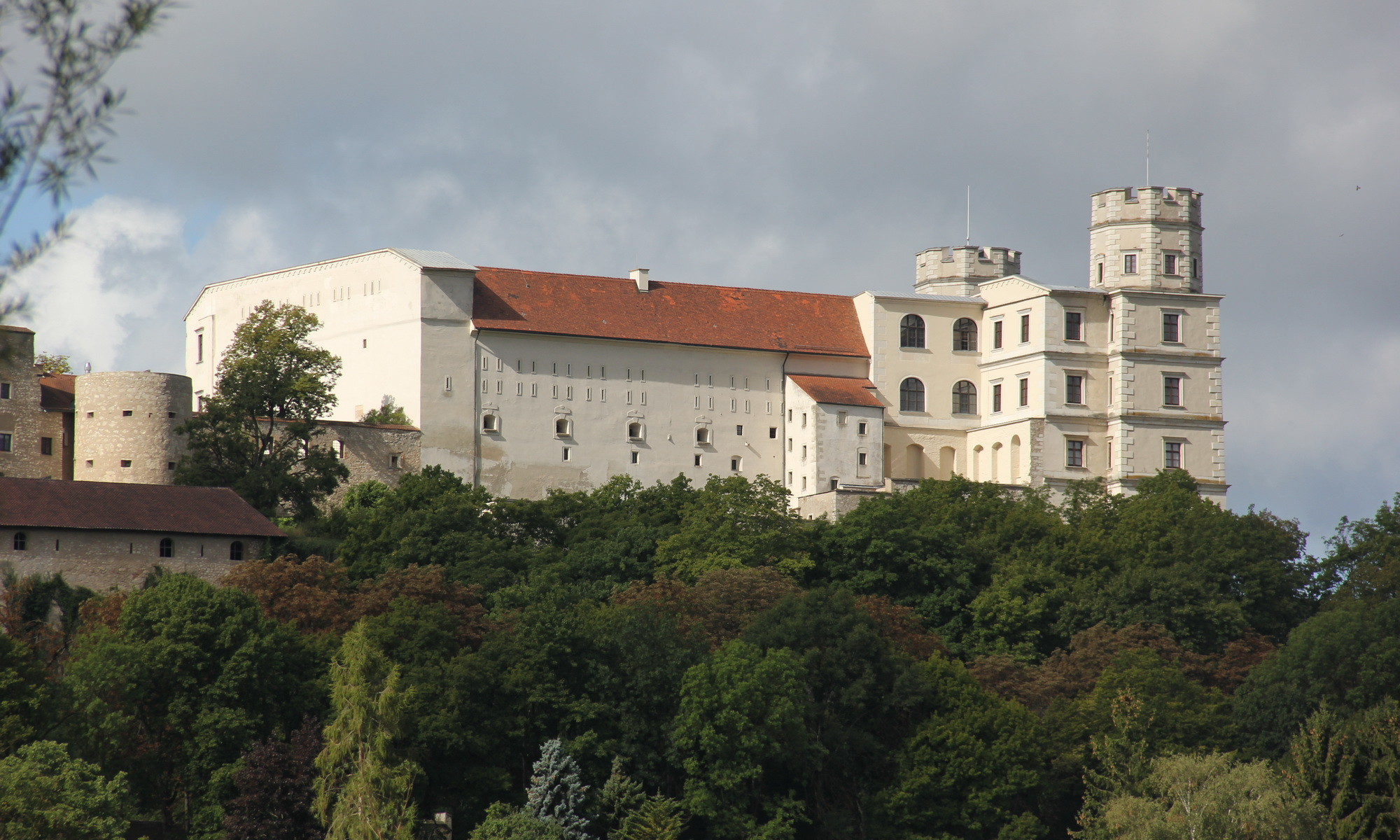 Willibaldsburg, Eichstätt, Upper Bavaria, Germany